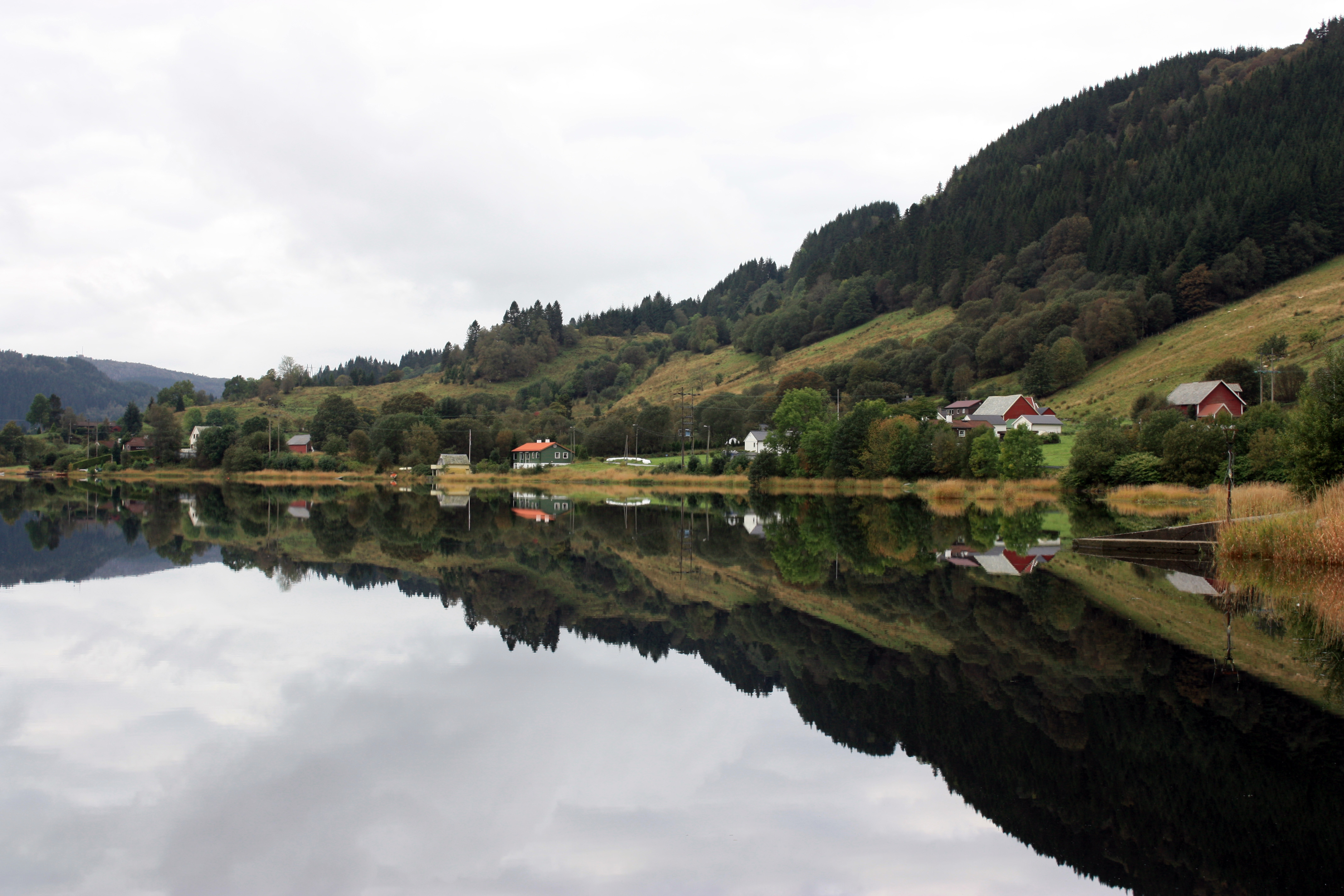 Indre Hamre, Fana, Bergen.